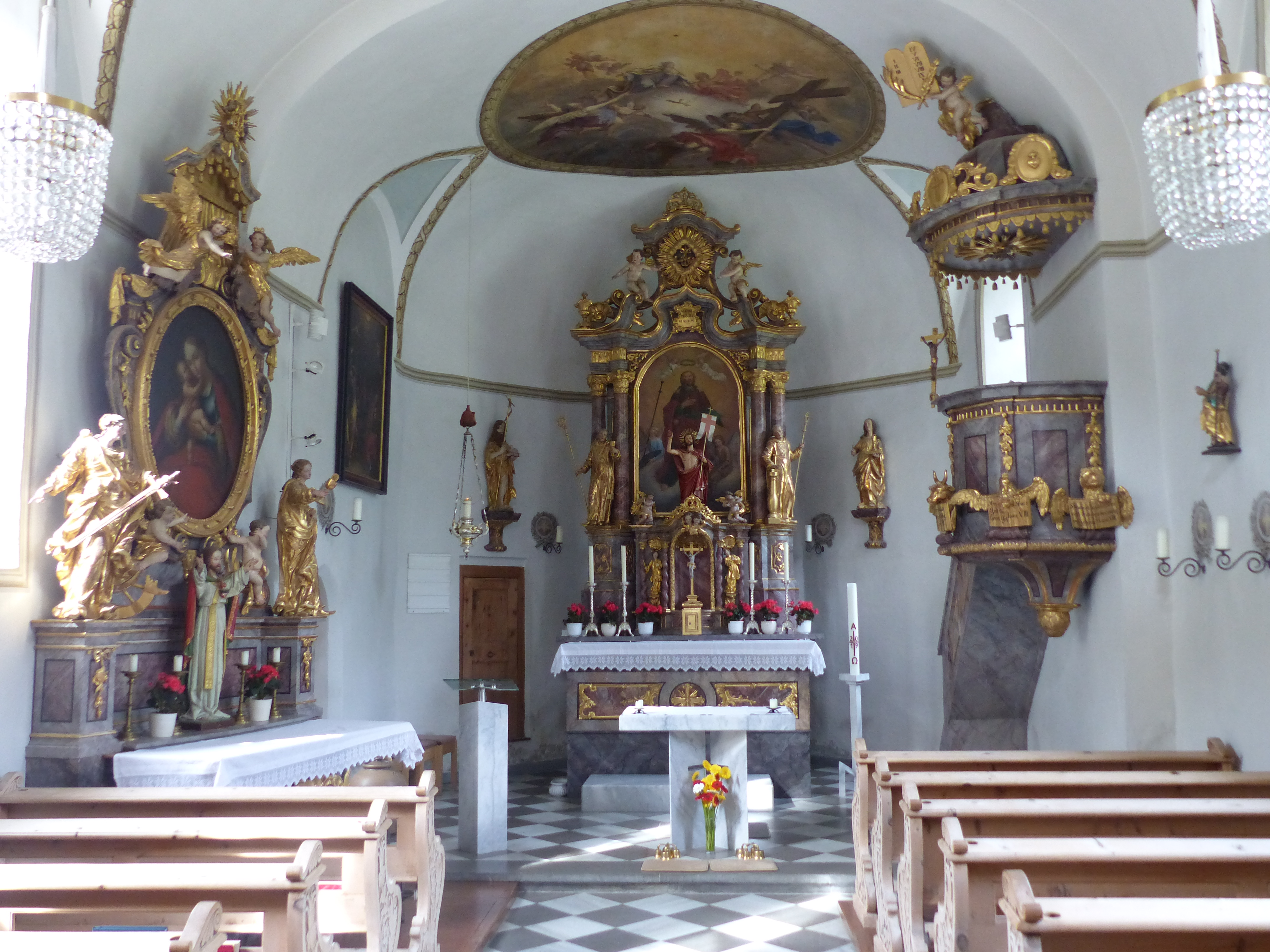 Pfarrkirche hl. Jakob, Vent